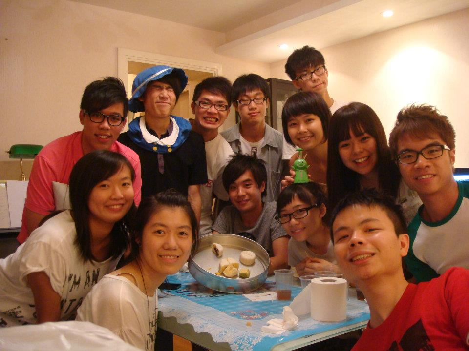 中文（香港）: 香港青年捐血社會員聯誼活動